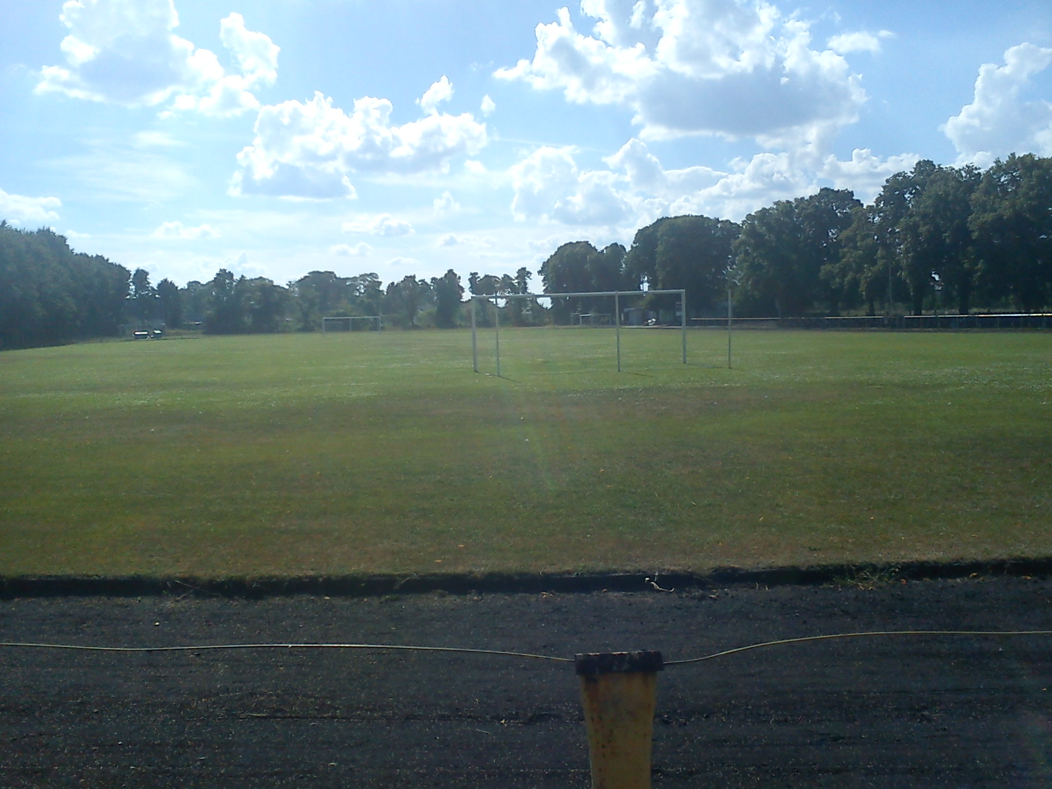 Boisko Rogozińskiego Klubu Sportowego "Wełna Rogoźno"